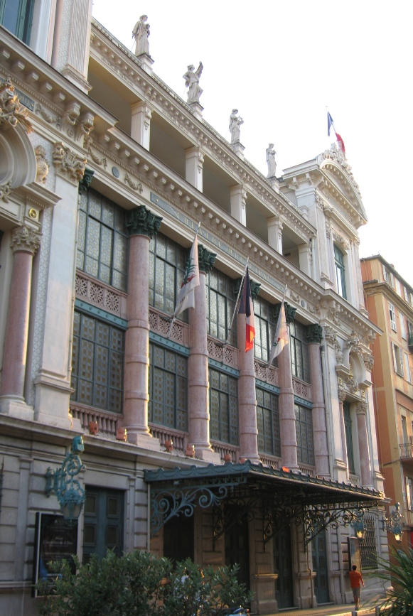 La façade de l'opéra de Nice